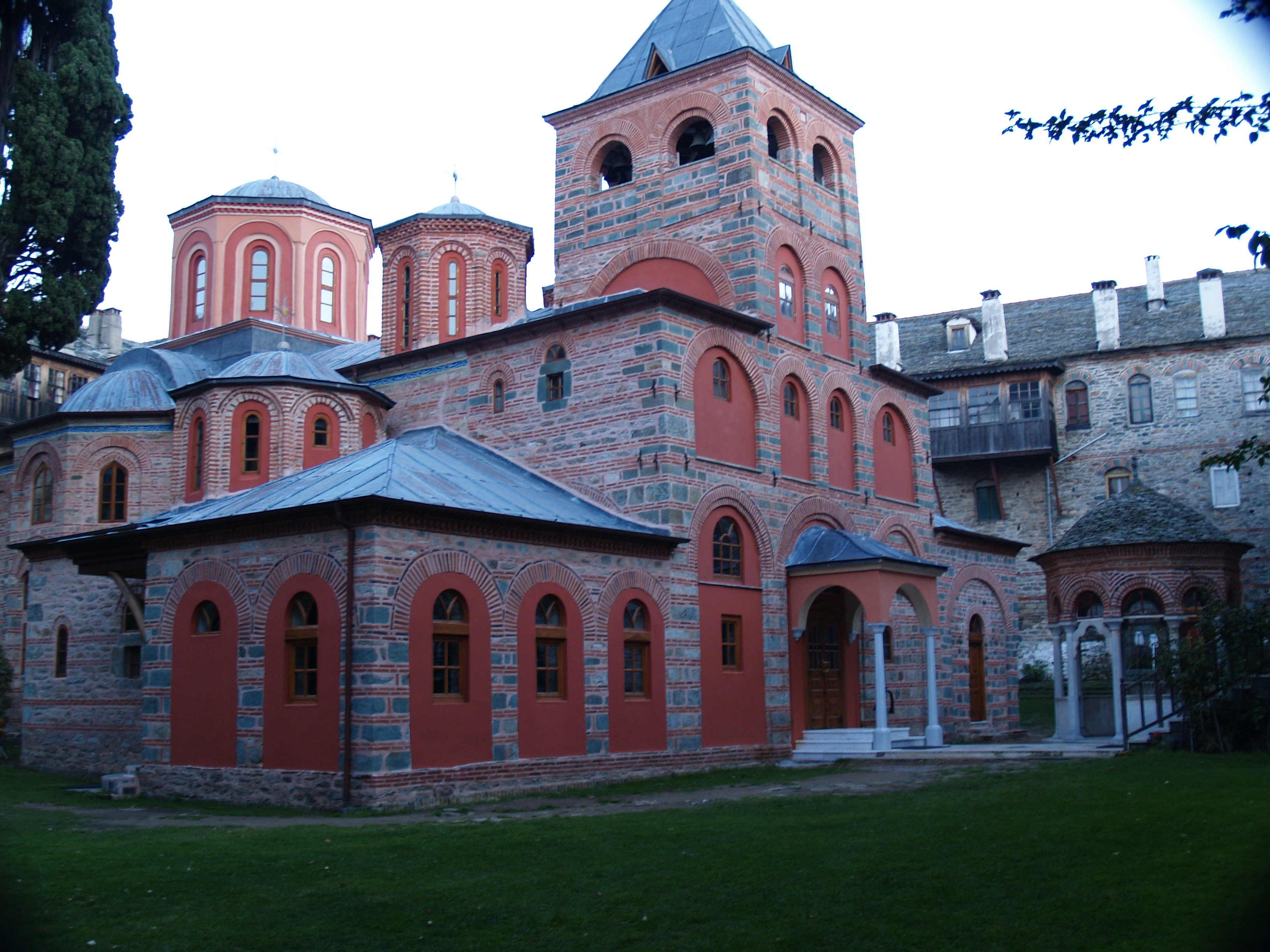 «Μονή Φιλοθέου»